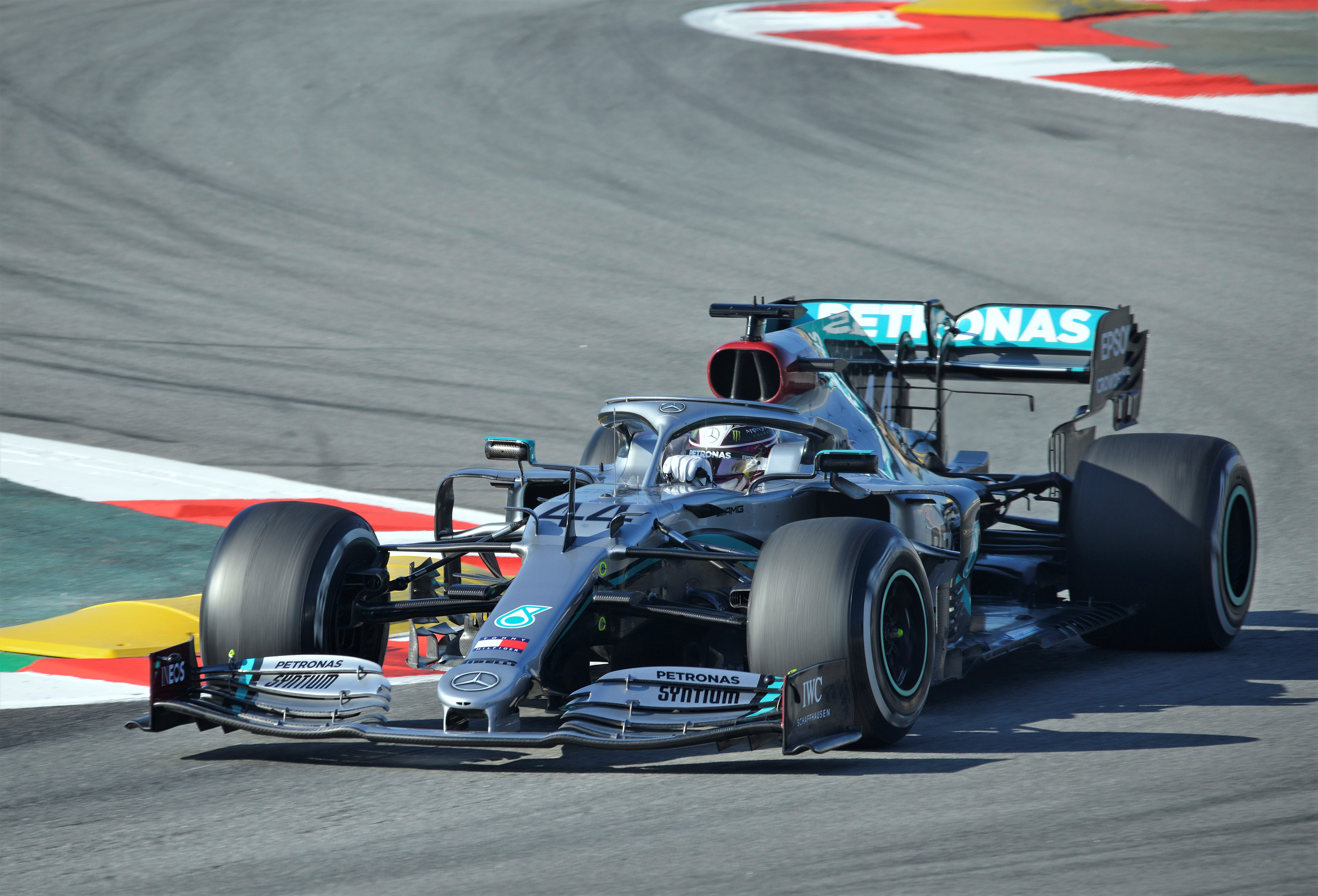 Test Days F1 2020